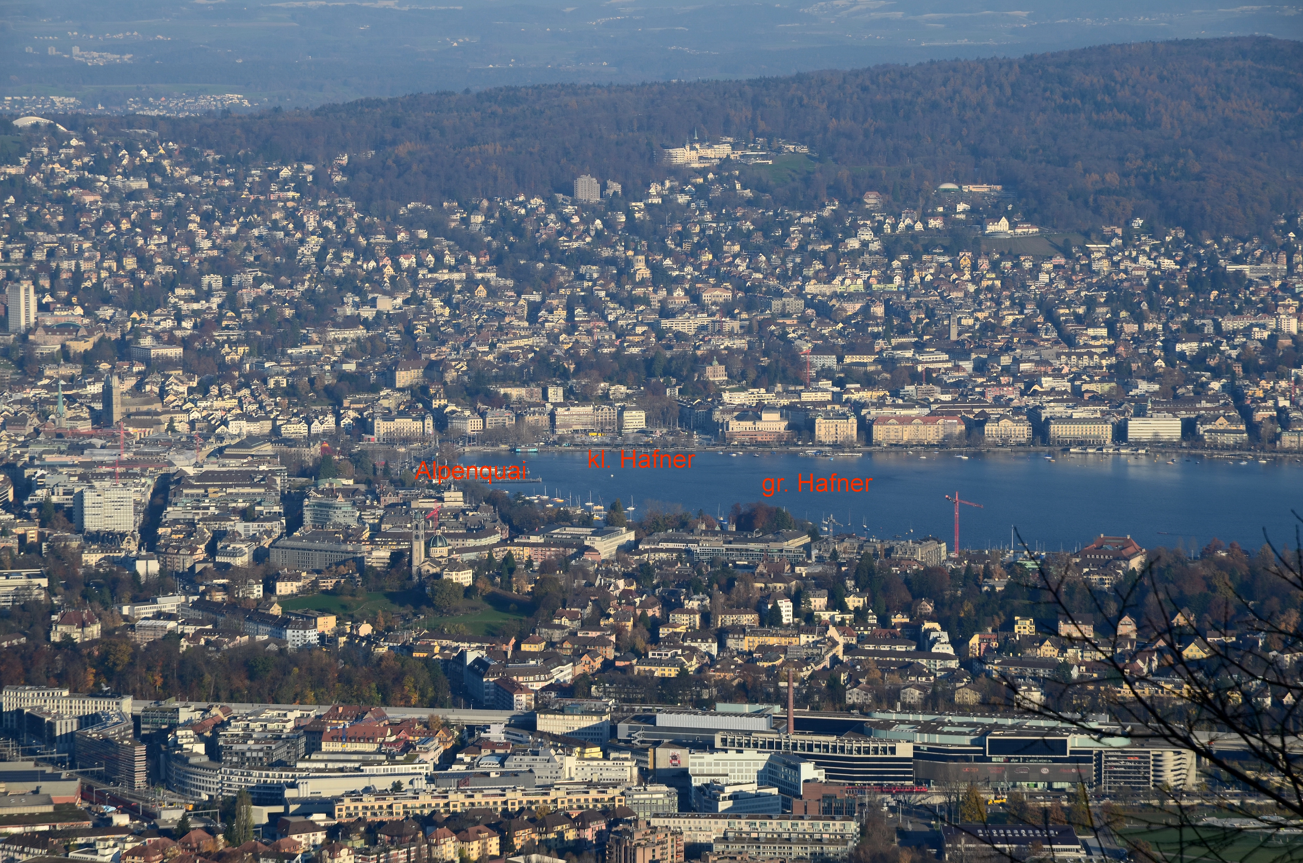 Standort der neolithischen 'Pfahlbausiedlungen' Alpenquai und Kleiner Hafner im unteren Zürichseebecken in Zürich, Ansicht vom Uetliberg